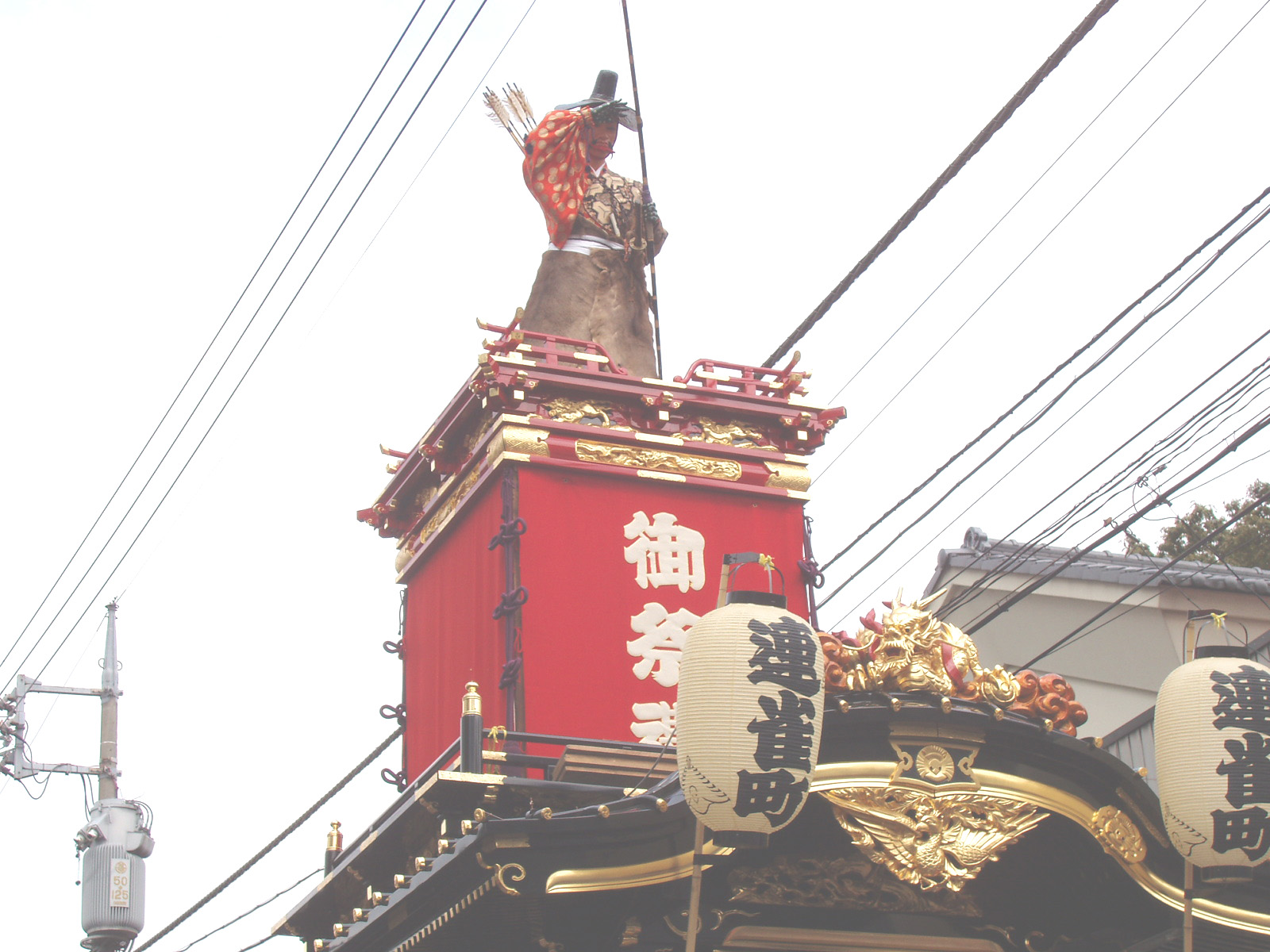 川越まつりで使用されている山車のひとつ。太田道灌の人形が上部に飾られている。